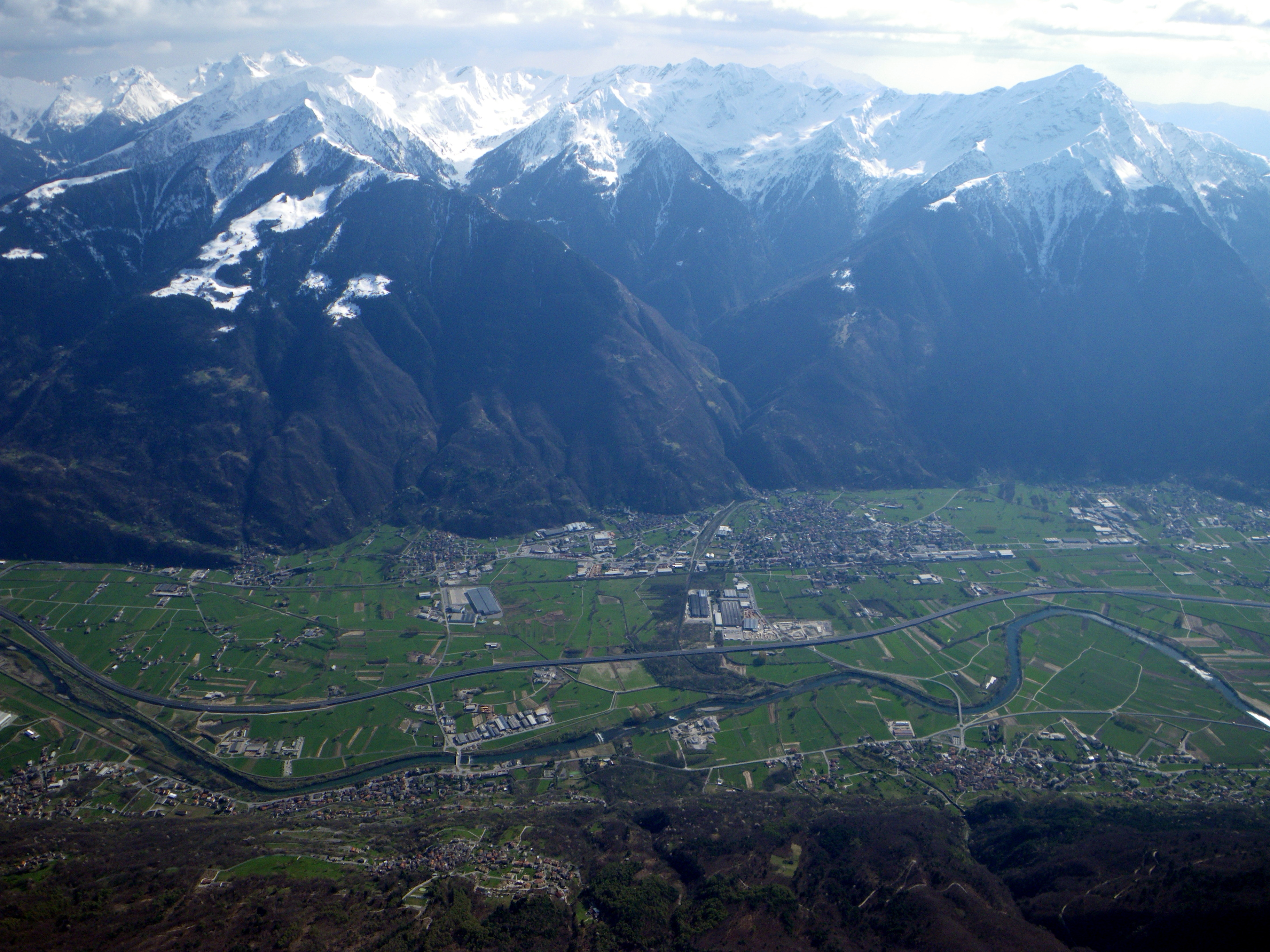 Delebio beach